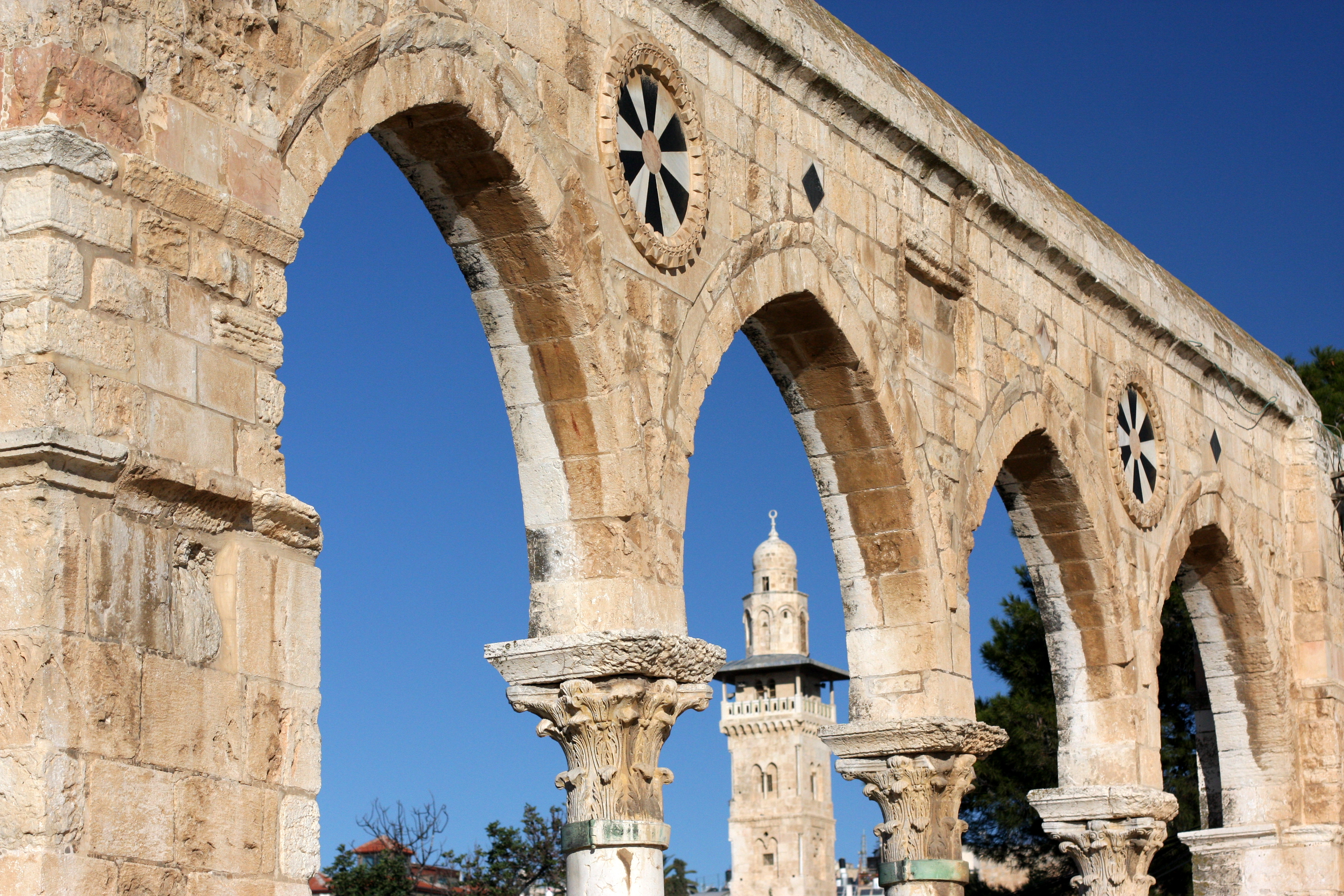 Temple Mount, Jerusalem, Palestine